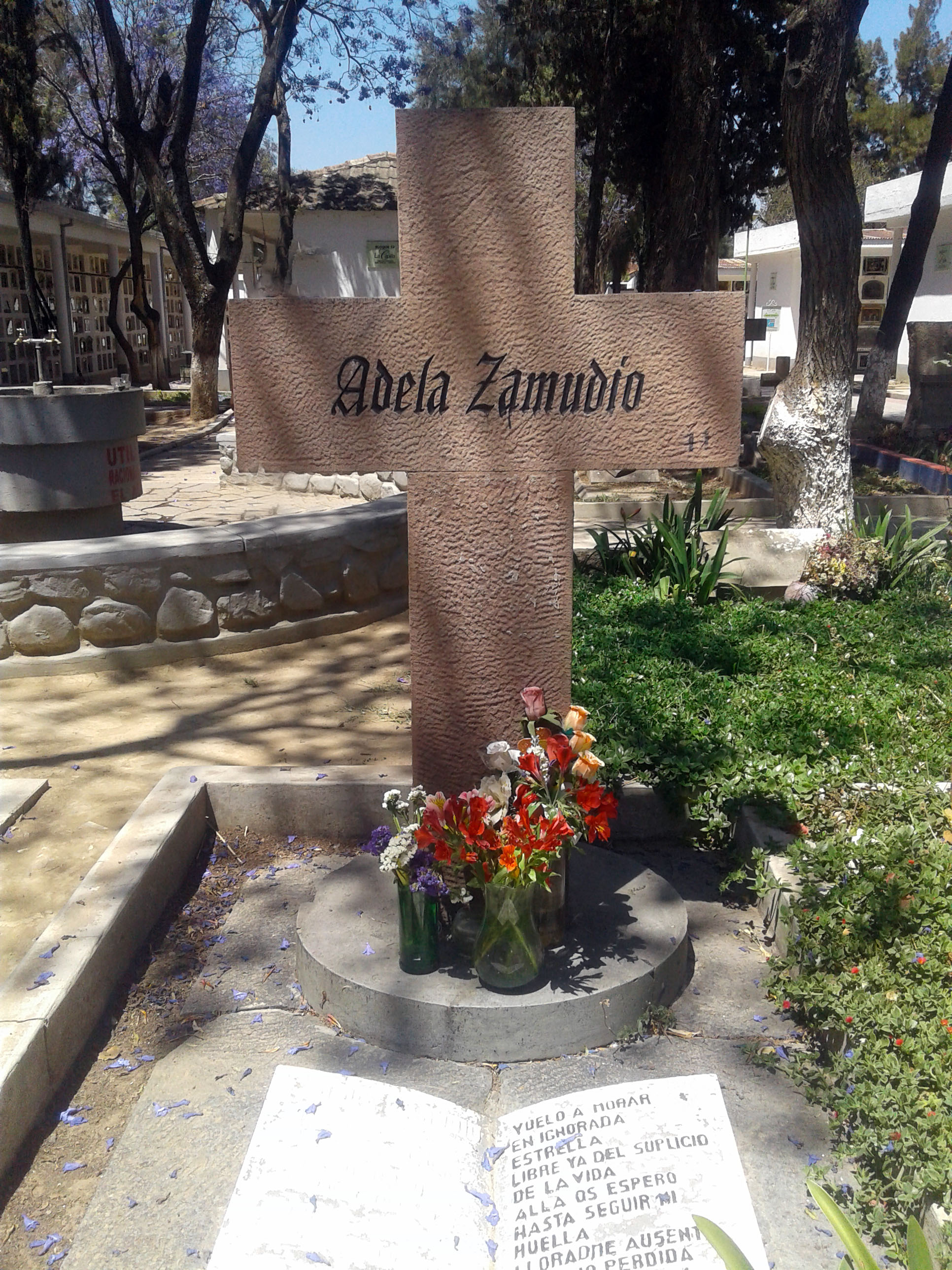 Adela Zamudio fallece el 2 de Junio de 1928 en Cochabamba-Bolivia, su tumba se encuentra ubicada en el Cemeterio General de Cochabamba.